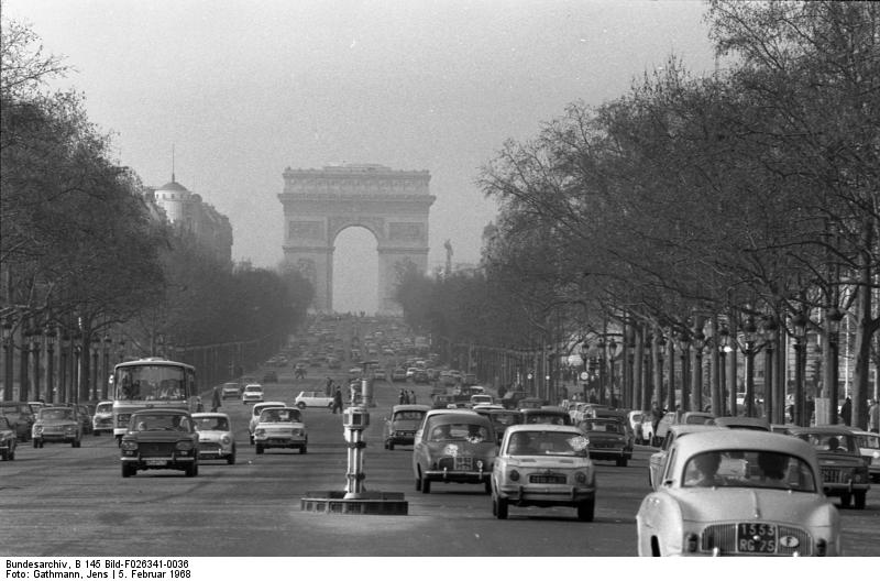 Einweihung der deutschen Botschaftsresidenz, Palais Beauharnais, in Paris: 2-17 Bundespräsidenet Lübke und Gattin besichtigen das "Jeu de Paume" in Begleitung der Botschafter-Gattin Frau Klaiber. 20-22 Frühstück im Elisée für Bundespräsident Lübke.